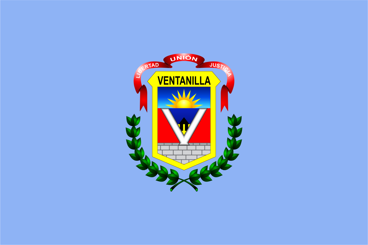 Distrito de Ventanilla - Provincia del Callao